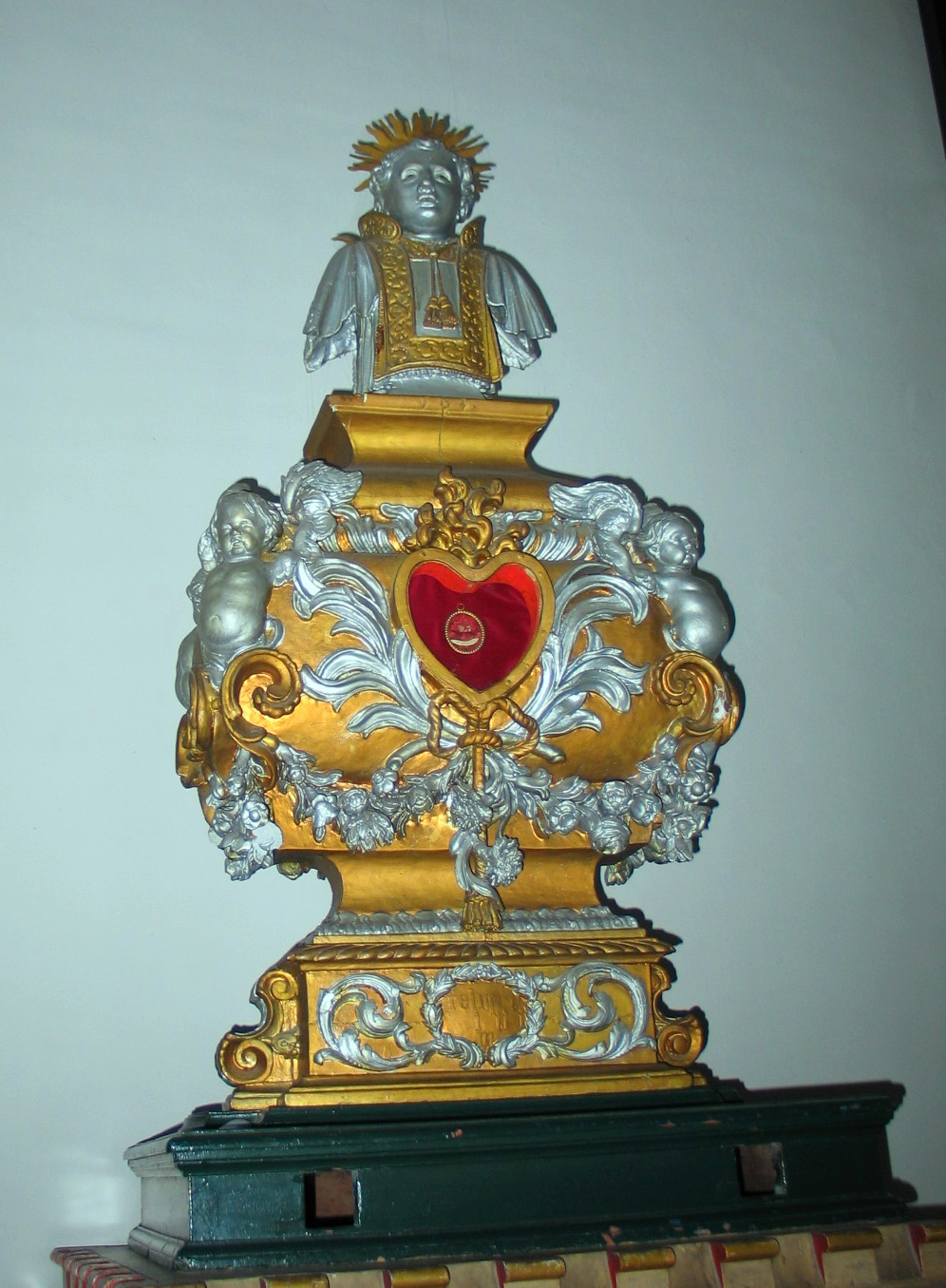 Kwinten in de St.-Kwintenskerk, zoals hij vroeger werd meegedragen in de processie van Sint-Kwintens-Lennik - eigen foto